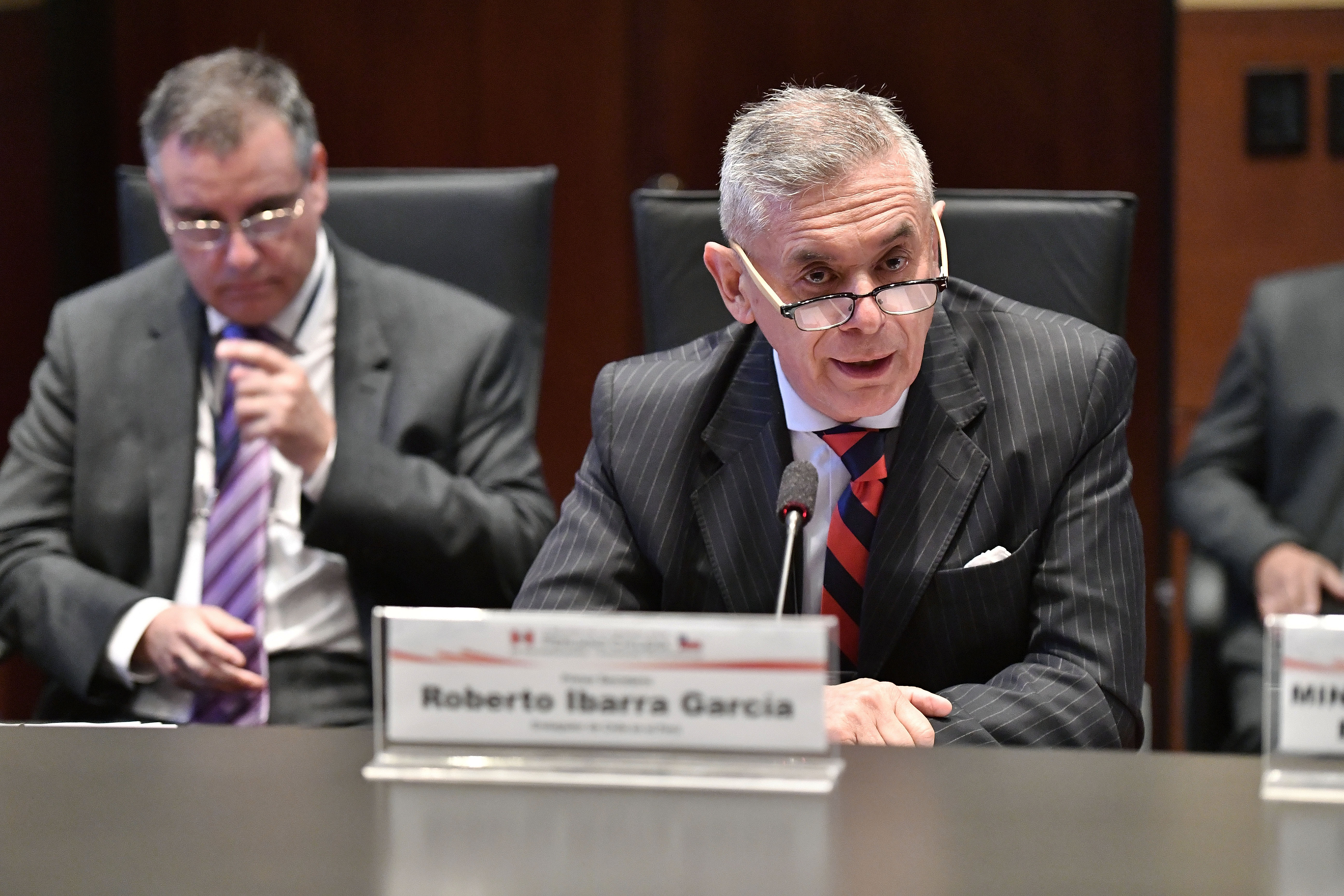 Roberto Ibarra García, embajador de Chile en Perú